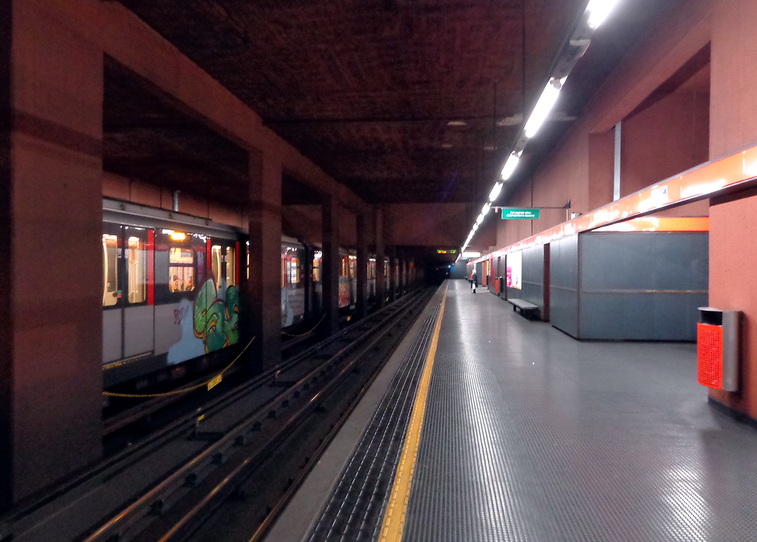 Stazione di Bonola della metropolitana di Milano.